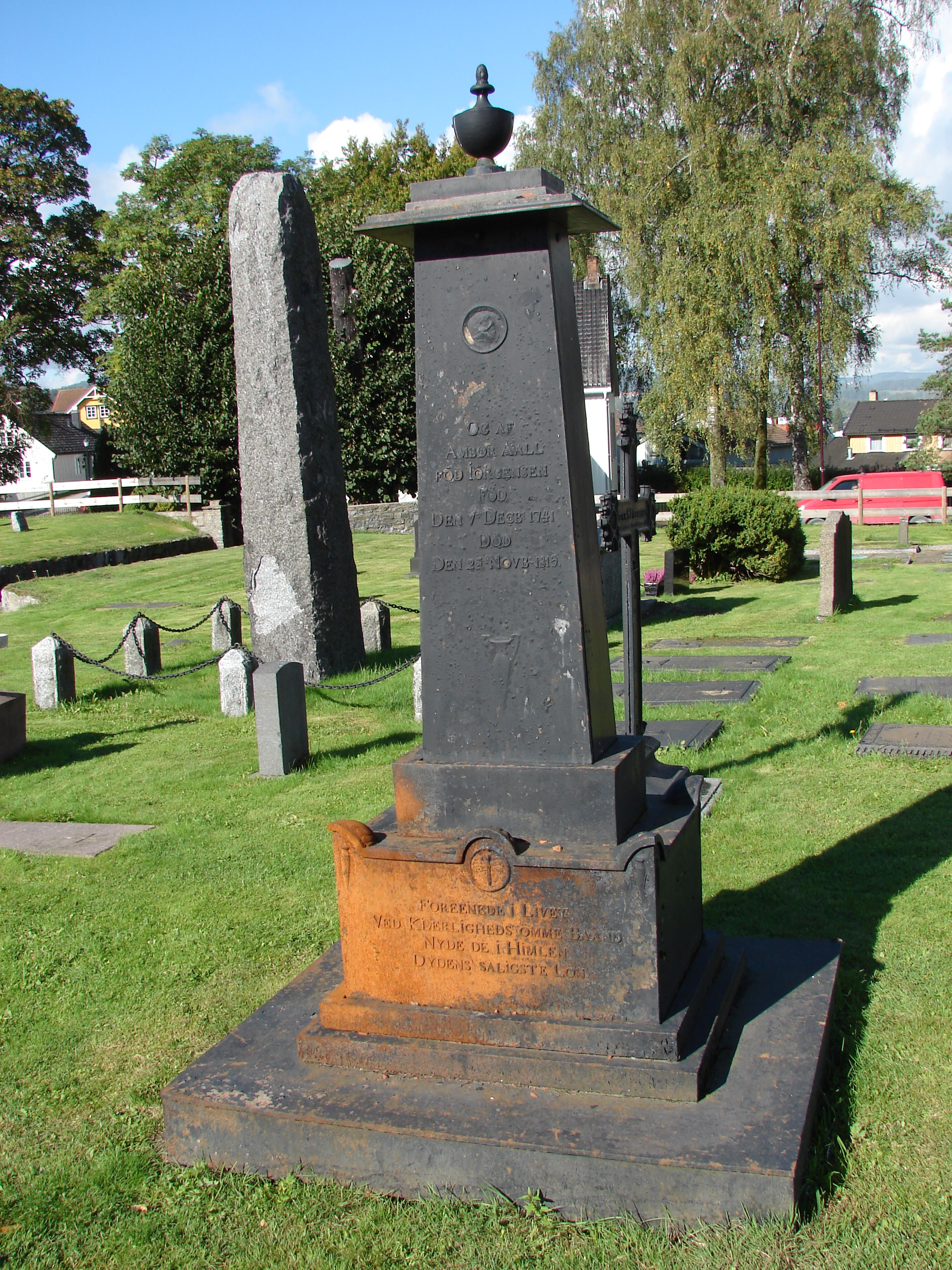 ... OG AF, AMBOR AALL, FÖD IÖRGENSEN, FÖD, DEN 7 DECB: 1741, DÖD, DEN 25: NOVB 1815, FORENEDE I LIVET, VED KJÆRLIGHED ÖMME BAAND, NYDE DE I HIMLEN, DYDENS SALIGSTE LÖN, gravminde ved Porsgrund Østre Kirkegård, Porsgrunn